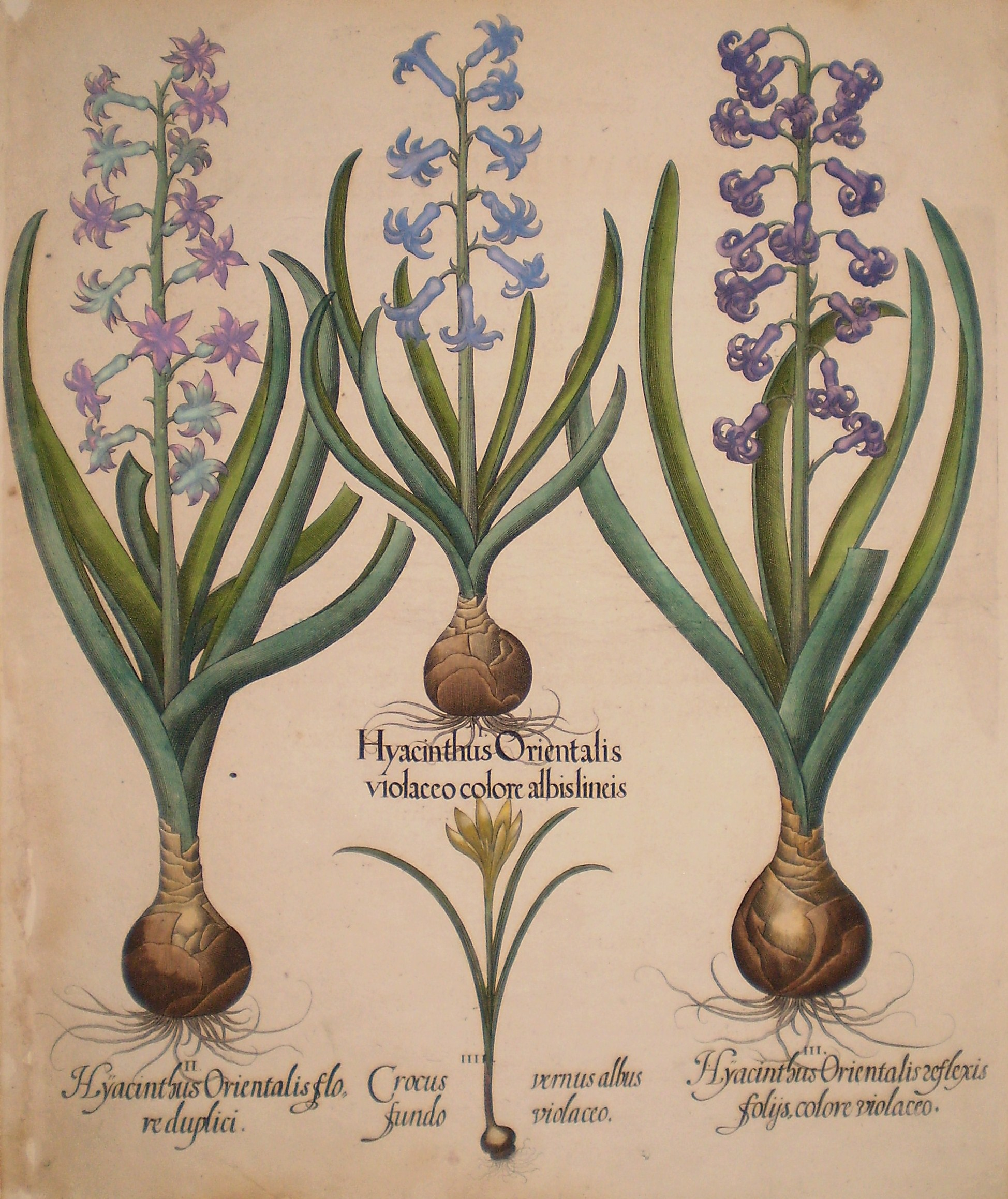 Disegno delle specie Hyacinthus orientalis floreduplici, Hyacinthus orientalis violaceo albislienis, Crocus vernus albus fundo violaceo e Hyacinthus orientalis reflexis folys colore violaceo provenienti dell'edizione del 1613 a Norimberga del Celeberrimi Eystettensis. Dall'archivio della Libreria antiquaria Bourlot di Marco Birocco, Torino